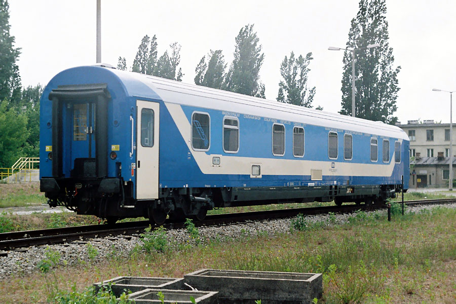 Prototypowy wagon typu 305Ab na stacji Warszawa Grochów.